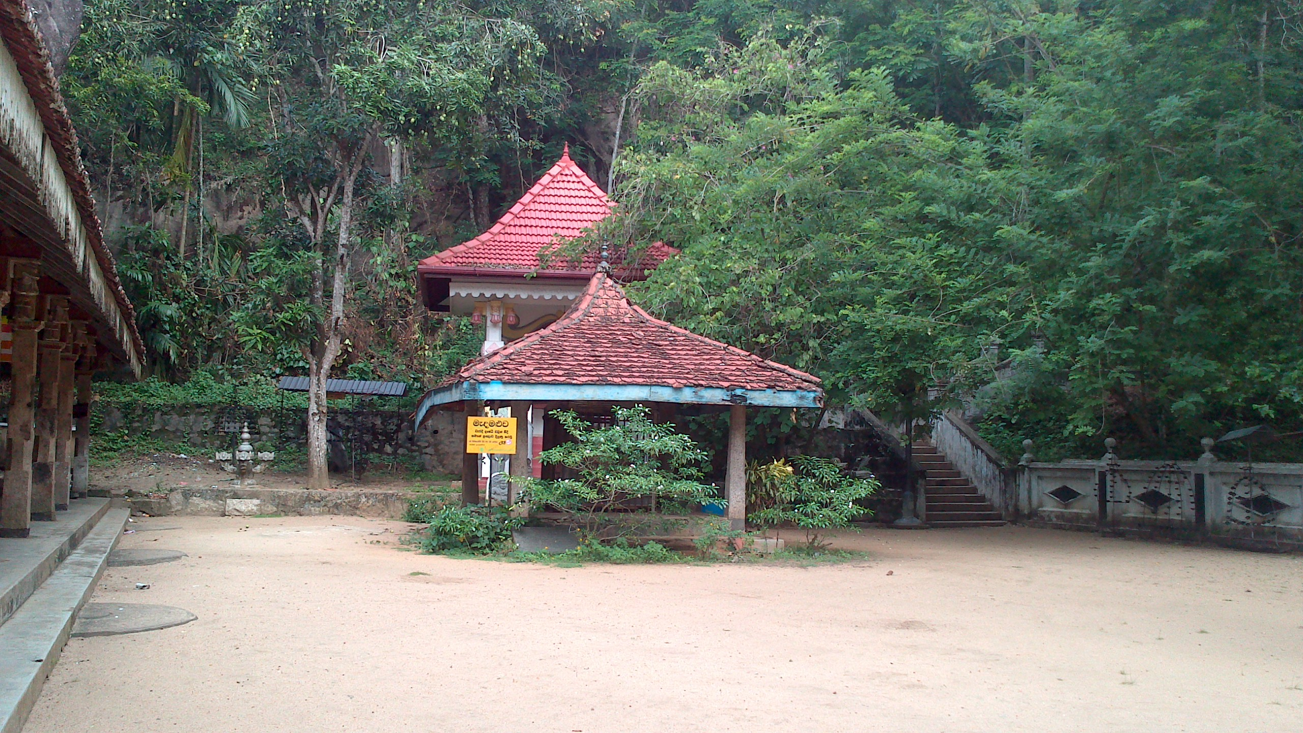 සිංහල: වාරණ රජමහා විහාරයේ මැද මළුවේ දර්ශනයක්